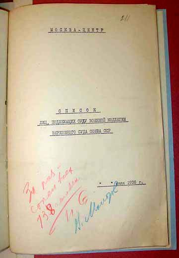 Резолюция за подписью Сталина за расстрел всех 138 человек.